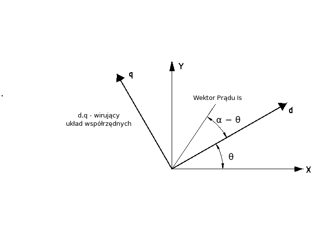 Przekształcenie Parka Odwirowanie - Wprowadzenie nowego wirującego układu współrzędnych d q